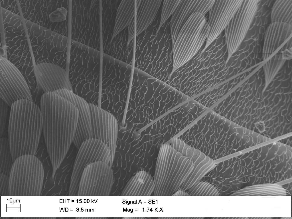 Immagine di una zanzara vista dall'alto registrata mediante SEM (microscopio elettronico a scansione). L'ingrandimento risulta di 1740X e evidenzia una parte del corpo.